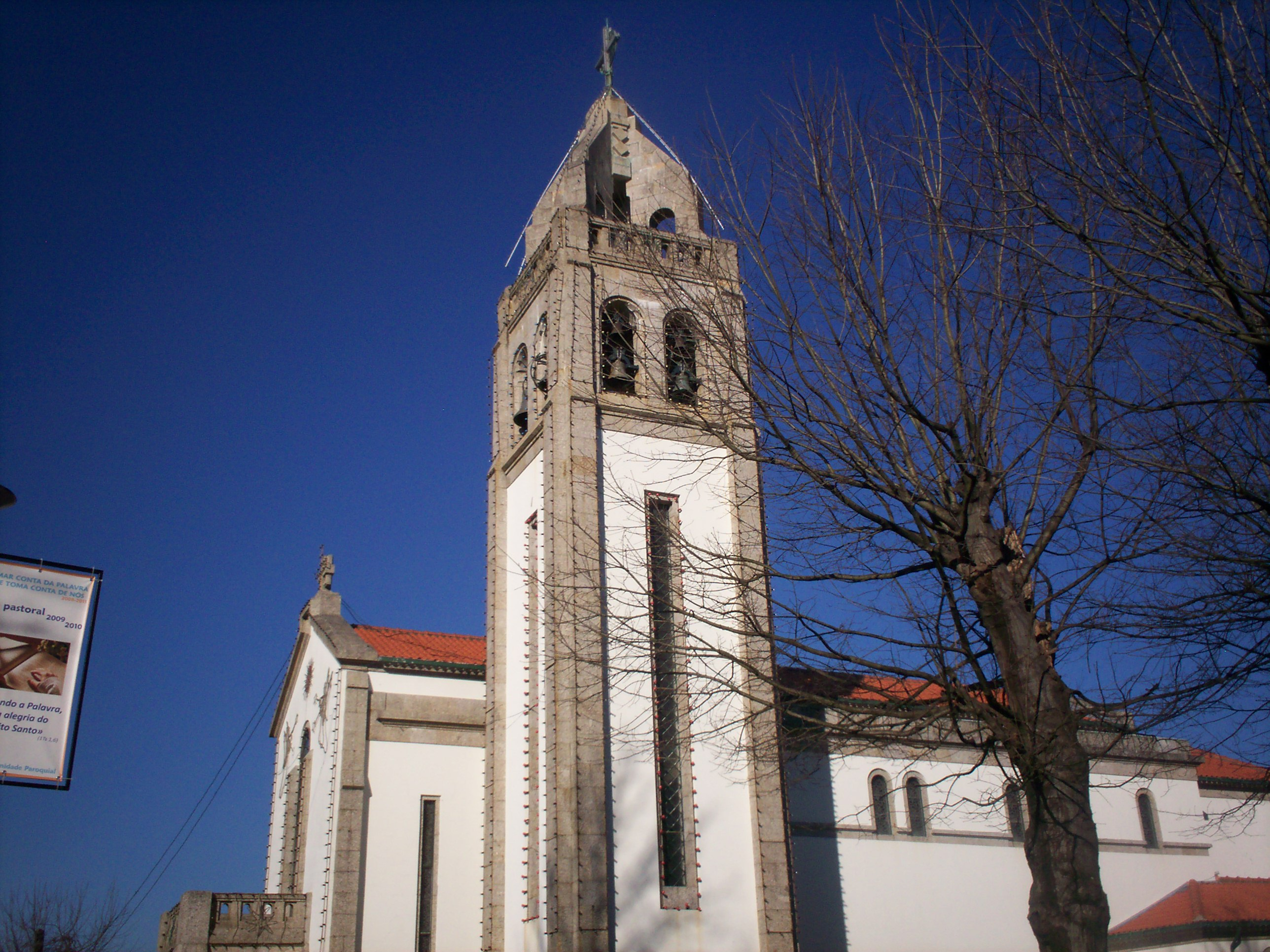 Igreja de Riba de Ave